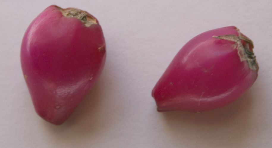 Schlumbergera truncata (Rhipsalideae; Cactaceae; Planta) kaktusz 'Exotic Dancer' változatának termése